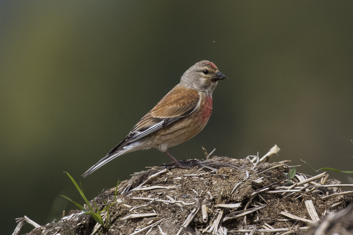 Eurasian Linnet - Aosta Valley - Italy_MG_2972